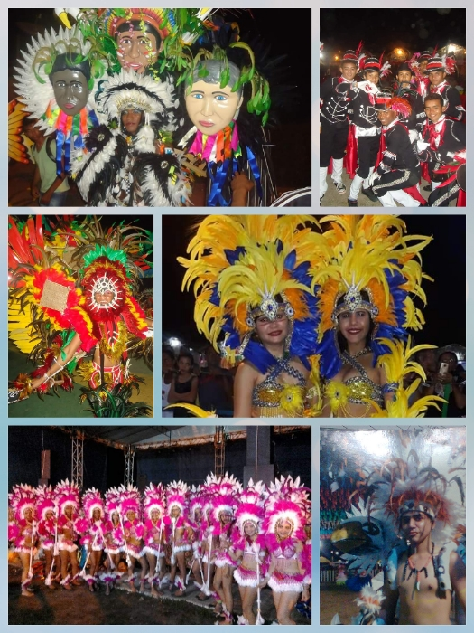 festas juninas